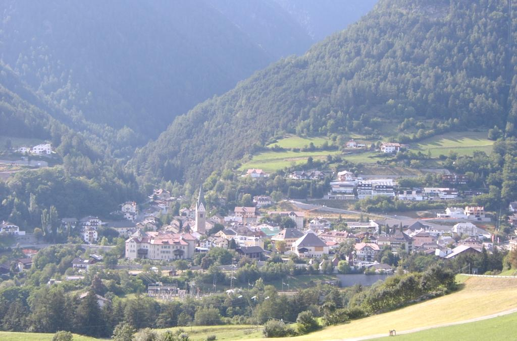 Mühlbach gesehen von der Rodenecker Straße aufgenommen von Christoph Federer (Fedi) Lizenzstatus: GNU FDL